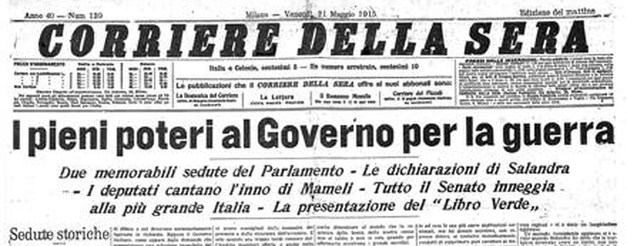 Prima pagina Corriere della Sera su seduta camera del 21 maggio 1915